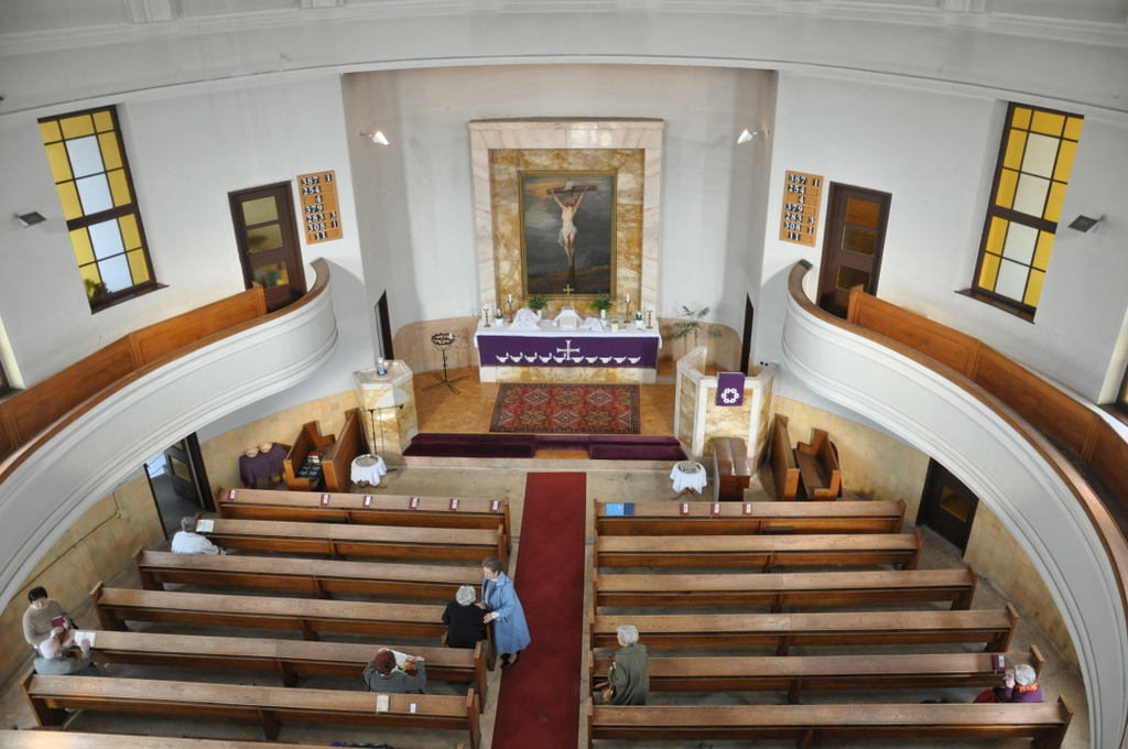 Evangelical-Lutheran church in Kápolna street, Budapest District X